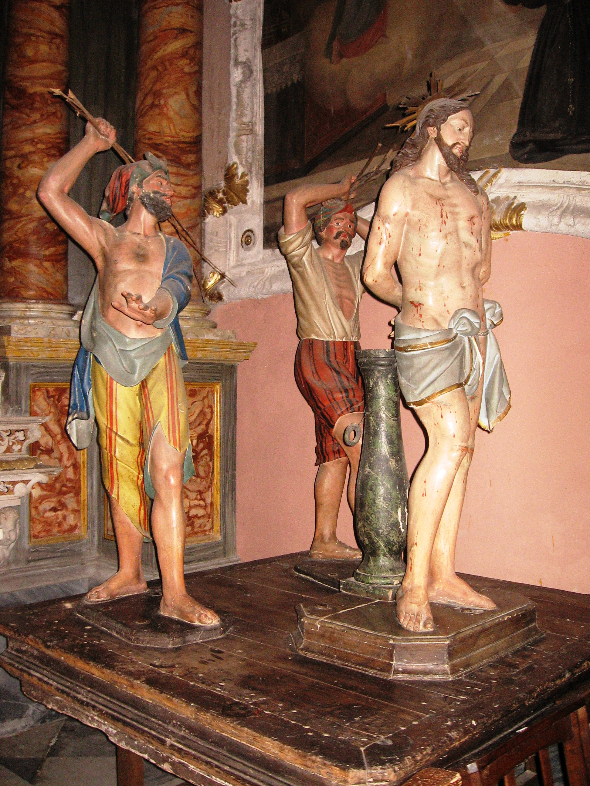 Cortemilia. Chiesa di San Michele Arcangelo. Gruppo processionale in legno dipinto policromo. Cristo alla colonna.